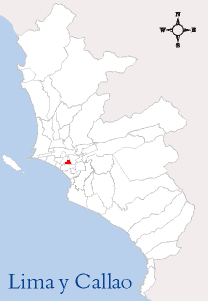 Localización del Distrito de Lince